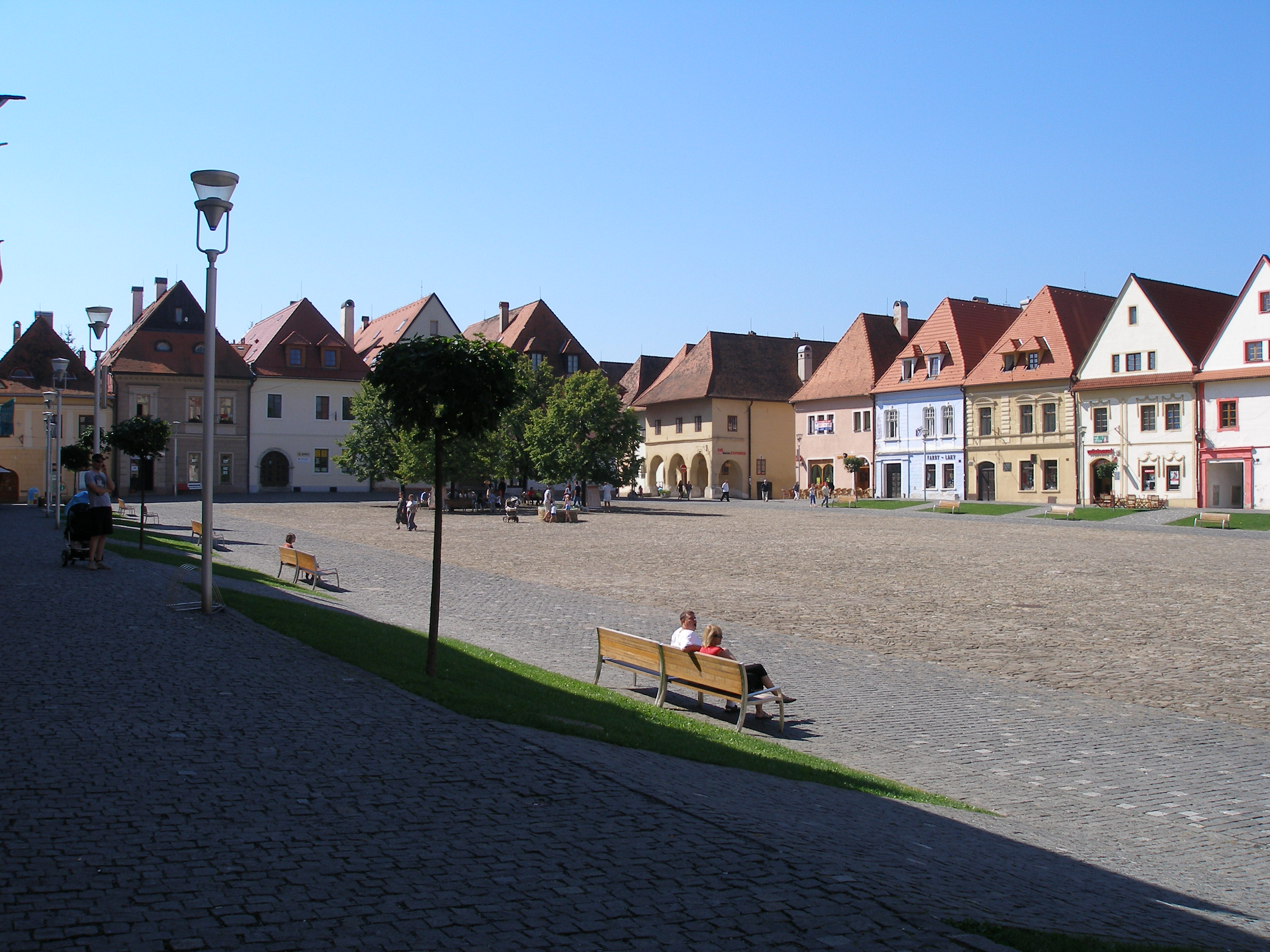 Renesančno-gotické námestie, starobylé námestie obdĺžnikového tvaru má rozlohu 260x80 metrov. V jeho strede sa nachádza architektonický skvost - Mestská radnica. Námestie jeobkolesené z troch strán 46-timi poschodovými meštianskymi domami, postavenými na typických úzkych stredovekých parcelách, kolmých na námestie. Do námestia sú orientované všetky významné ulice historického jadra. Dlažbu námestia tvorili pôvodne mačacie hlavy. Môžete ich tu vidieť i dnes. Námestie Bardejova bolo v stredoveku trhovým námestím - konali sa na ňom jarmoky. Najvýznamnejšou pamiatkou námestia je rímskokatolícka Bazilika svätého Egídia, stojacia v jeho severnej časti. Začali ju stavať začiatkom 15. storočia a postupne dostala podobu veľkolepej gotickej baziliky s tromi loďami. V interiéri zaujme súbor 11 neskorogotických oltárov z 15. a 16. storočia, z ktorých niektoré plastiky sa považujú za vrcholné európske rezbárske práce.